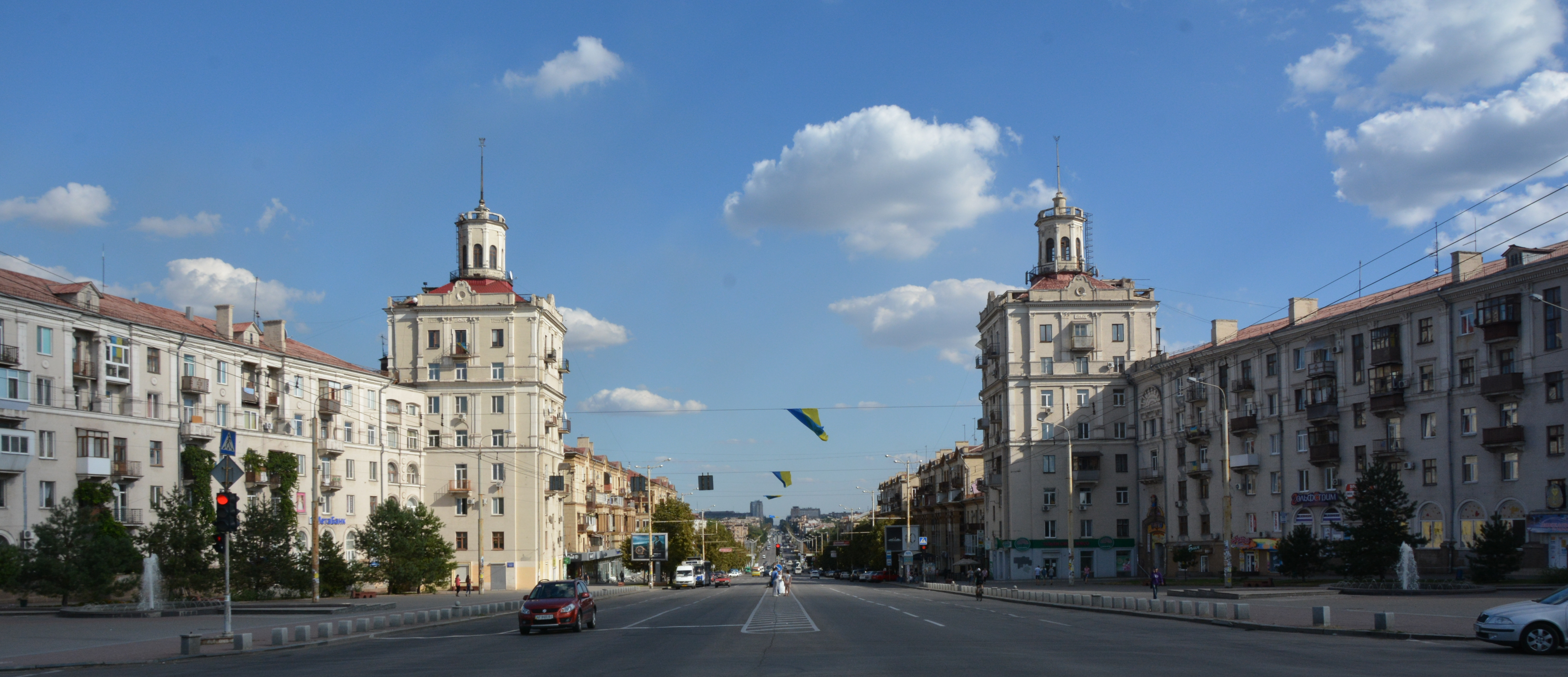 Леніна проспект, Запоріжжя, просп. Леніна